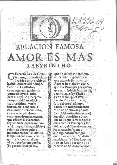 Relacion famosa, amor es mas labyrintho, impresso en Cordova, en la imprenta de la calle Carreteras. Conservado en la Biblioteca Nacional de España.